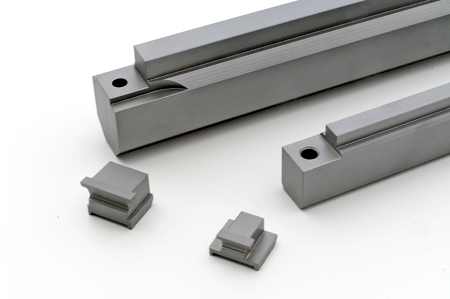 Gierth Stoßwerkzeuge